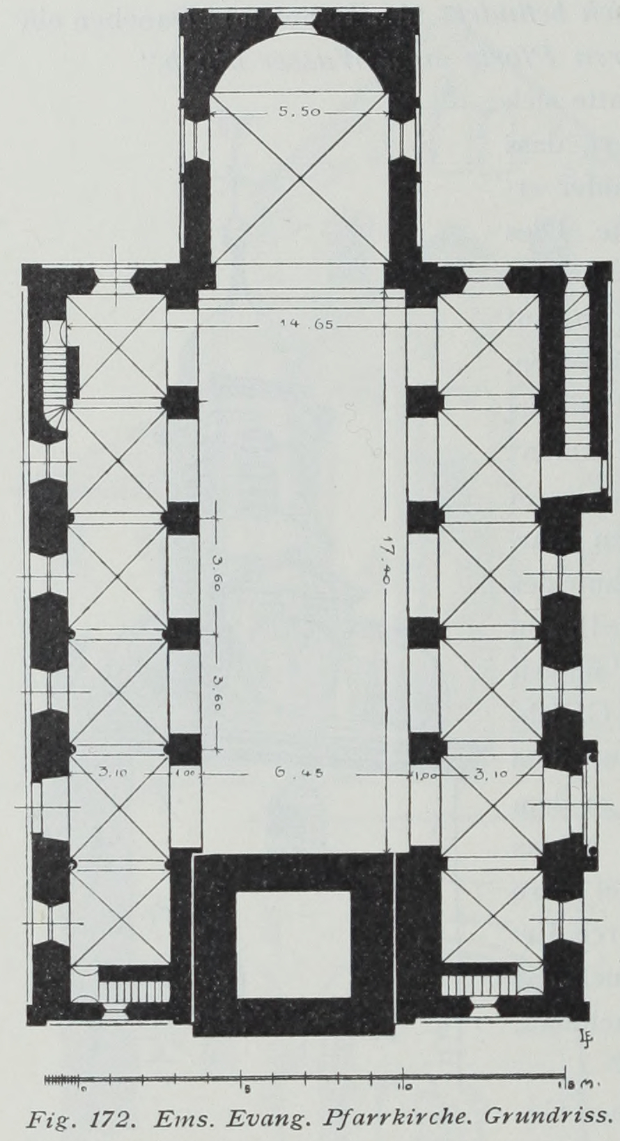 Ems evangelische Pfarrkirche Grundriss